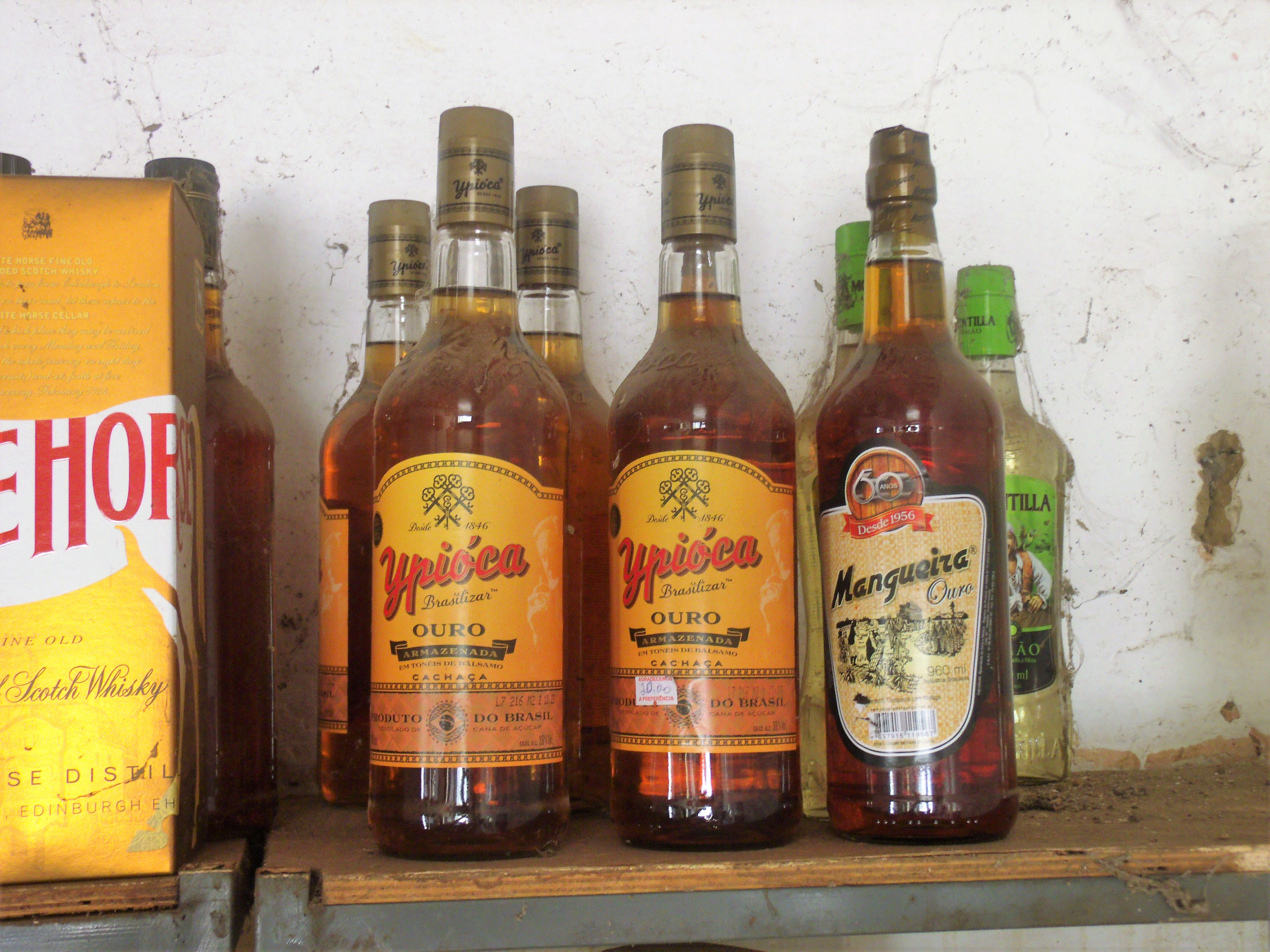 Cachaças em um bar no ano de 2018, a Ypióca do Ceará e a Mangueira de Castelo do Piauí..